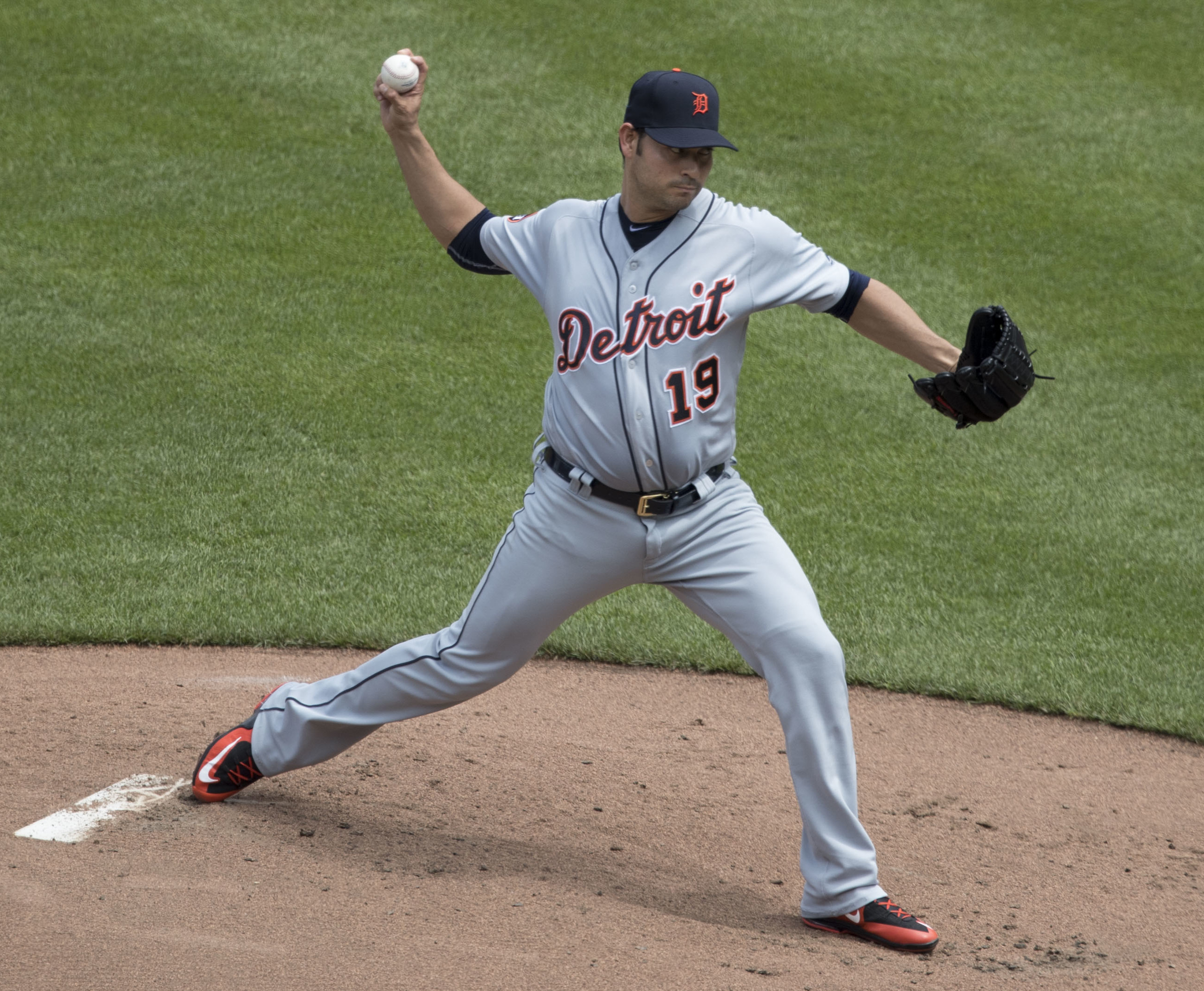 Tigers at Orioles 8/6/17